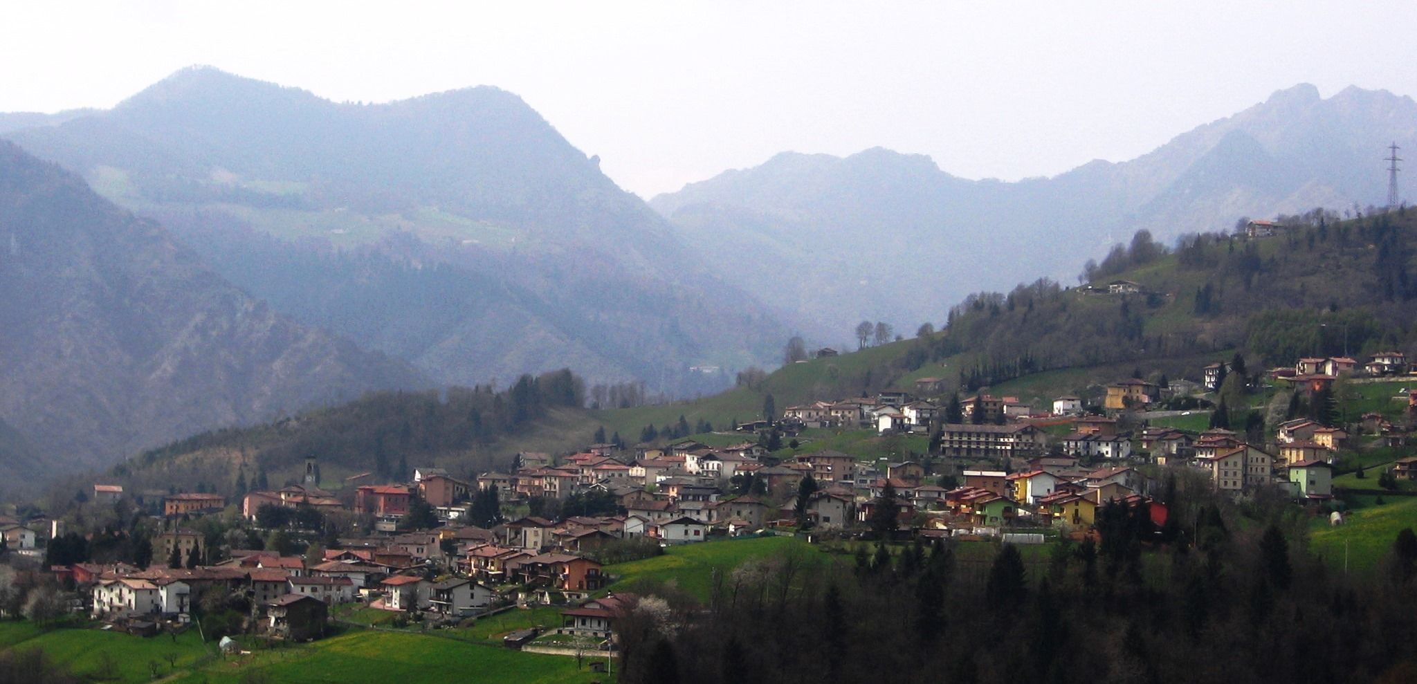 Premolo, Bergamo, Italia